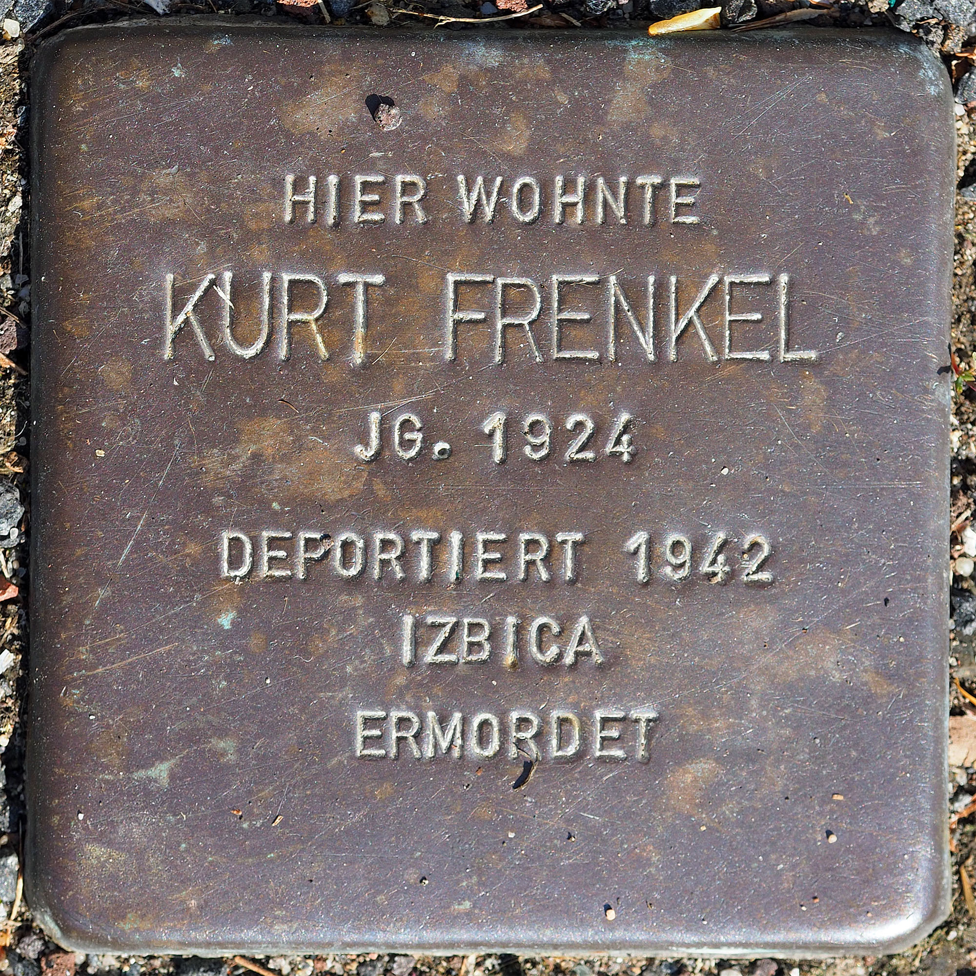 Stolpersteine MG: Frenkel, Kurt